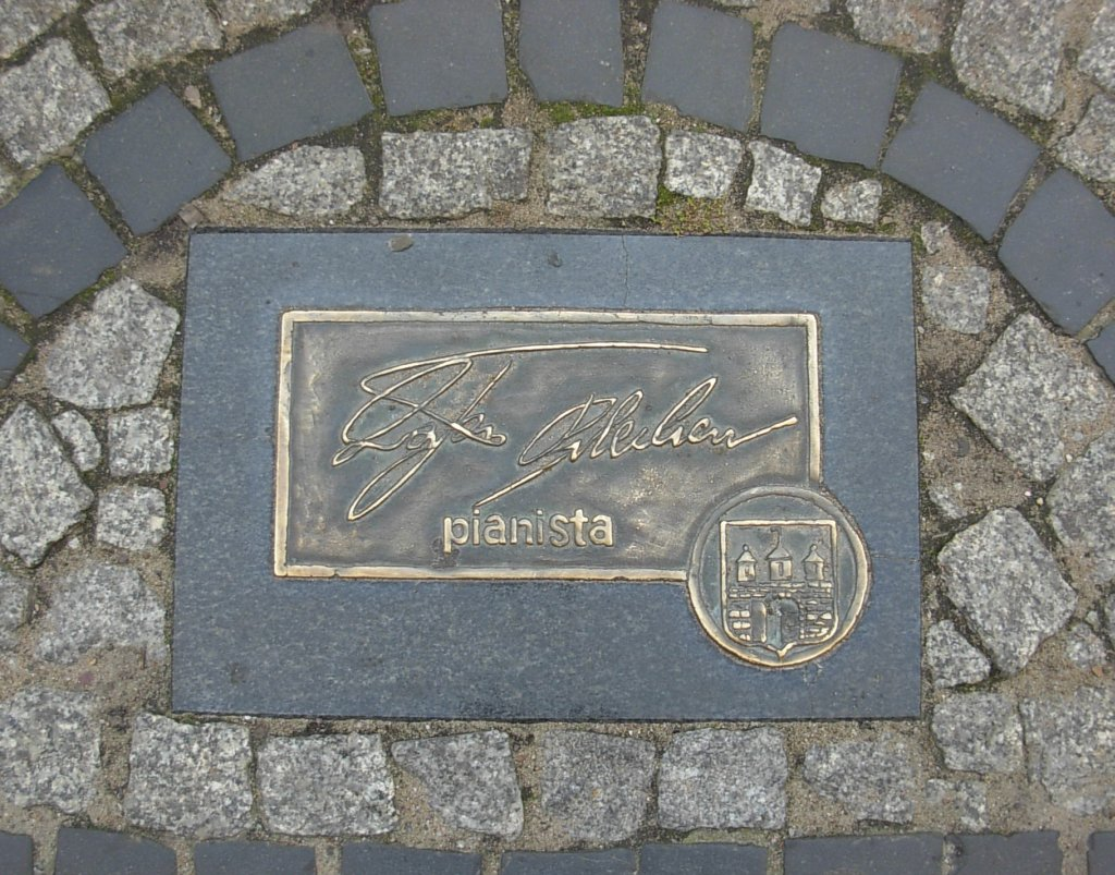 Bydgoska Aleja Autografów - Rafał Blechacz, 2007